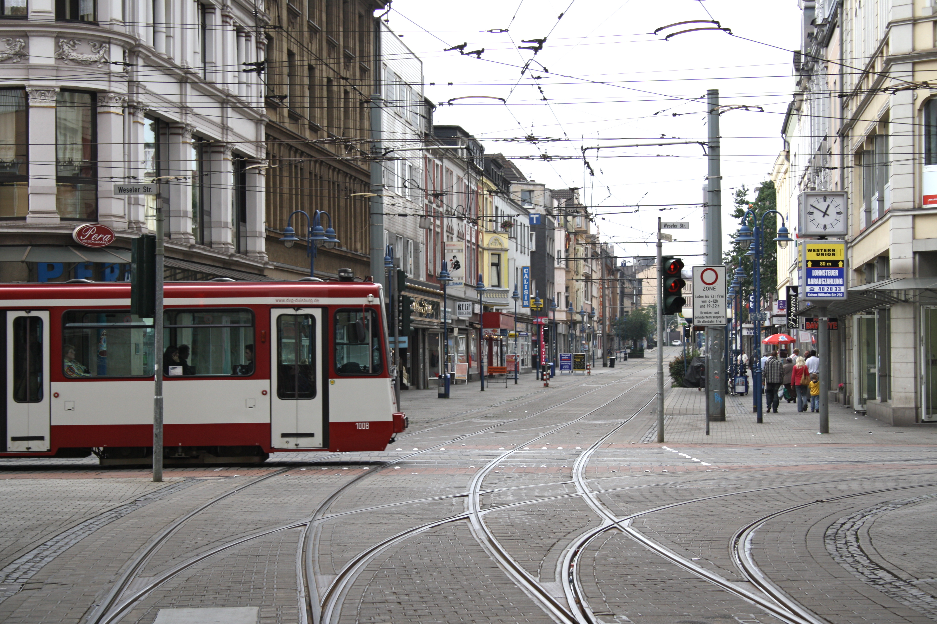 Straßenbahnkreuzung in Duisburg-Marxloh